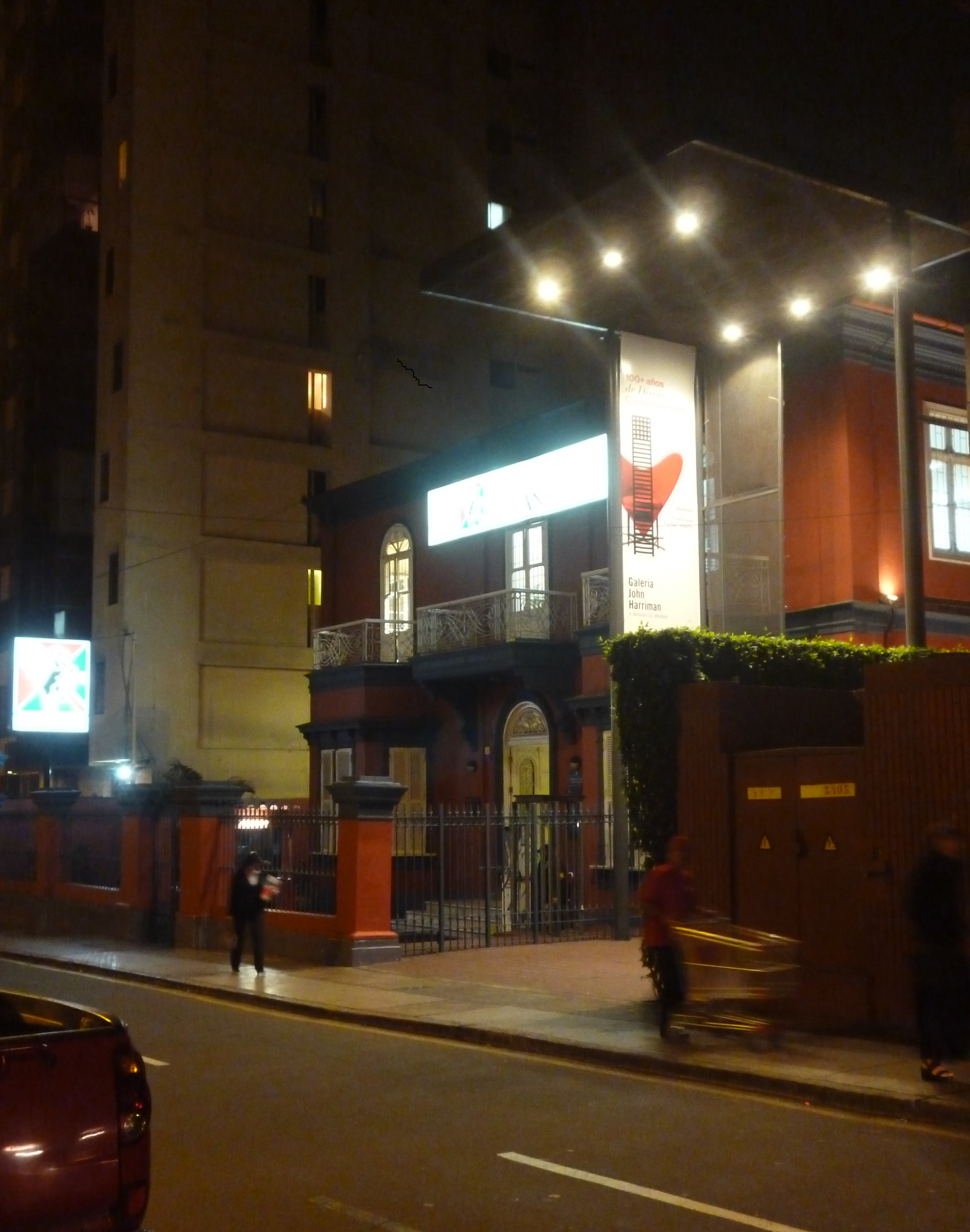 Asociación Cultural Peruano Británica - BRITÁNICO Miraflores Lima, Perú